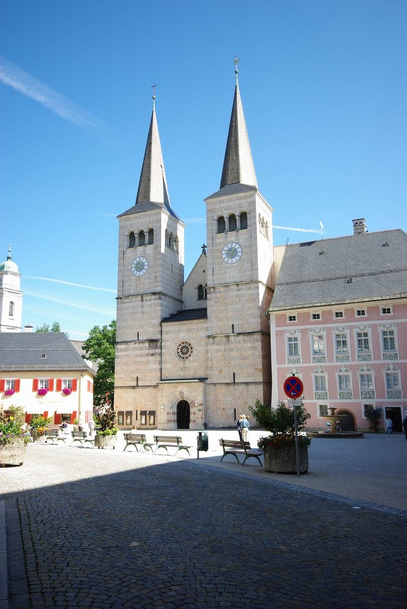 Schloßplatz 4, 83471 Berchtesgaden; Kath. Pfarrkirche, DoppelturmfrontThis is a photograph of an architectural monument.